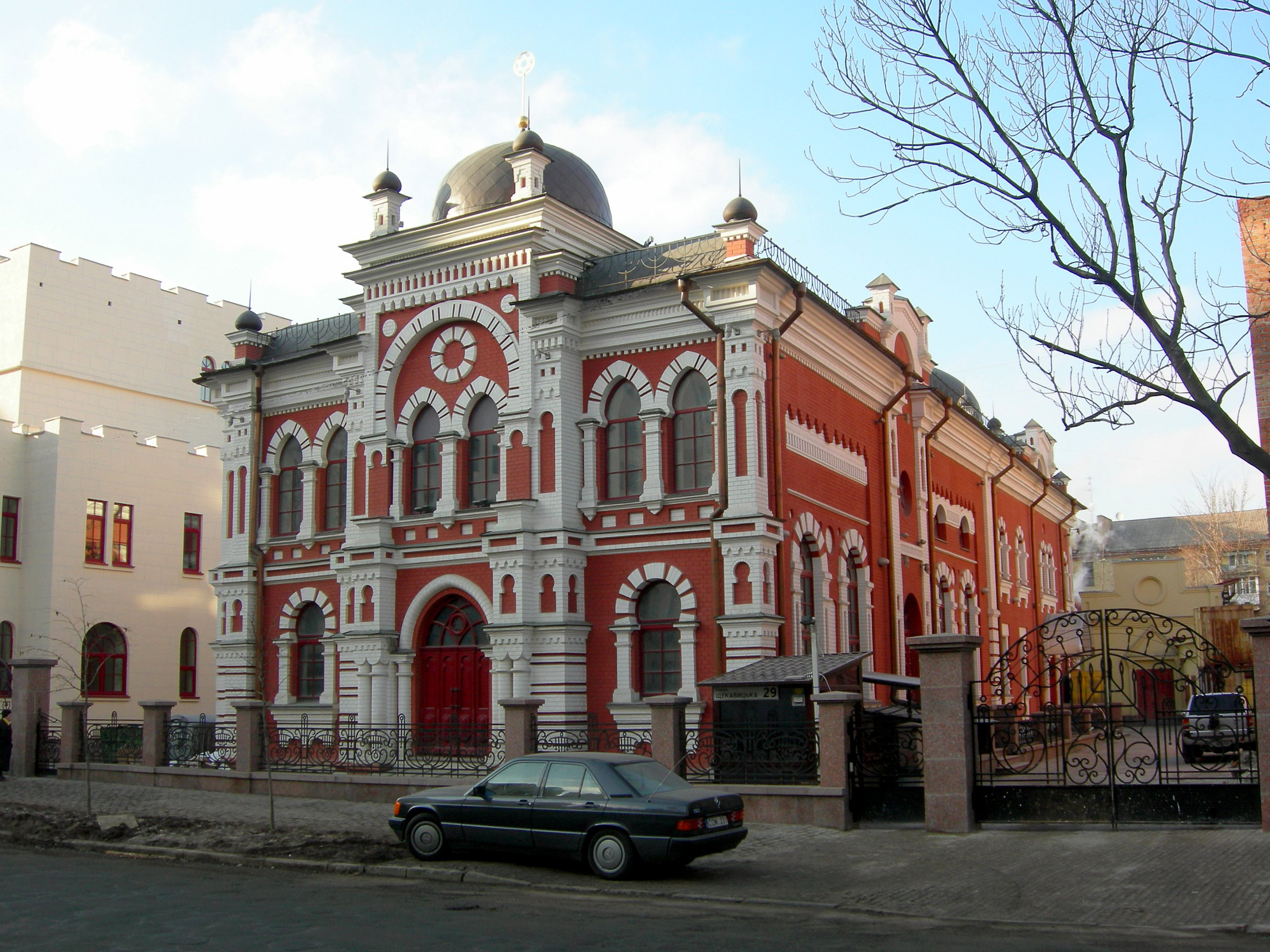 Будівля Київської іудейської громади, Київ, Щекавицька вул., 29